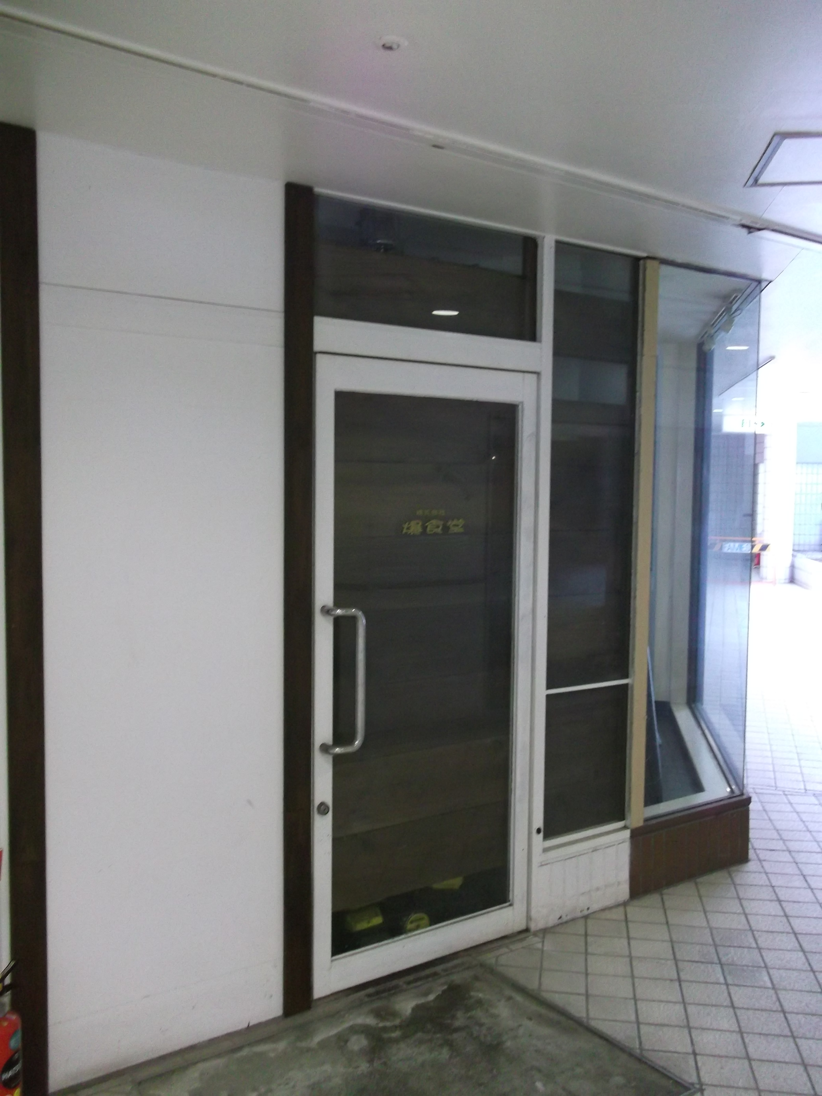 名古屋市天白区塩釜口に所在する「洋食工房パセリ」を運営する株式会社爆食堂事務所